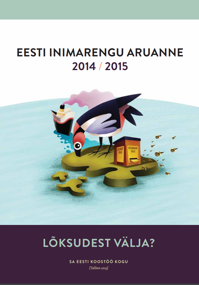 Eesti inimarengu aruanne 2014-2015 "Lõksudest välja" esikaas